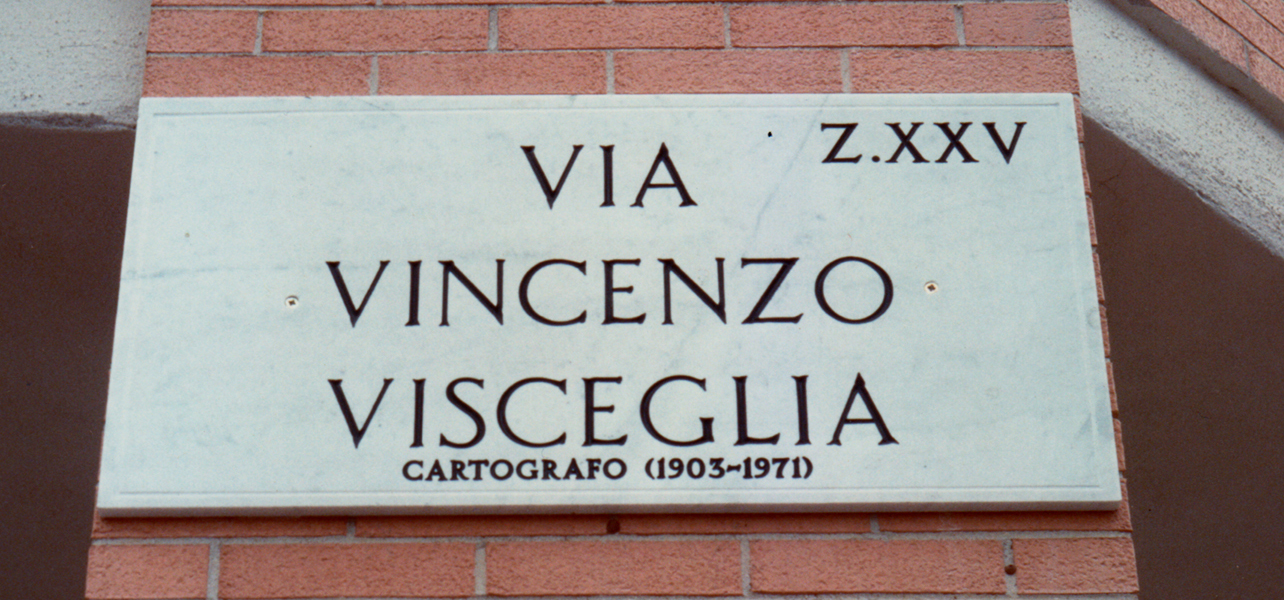 Strada dedicata a Vincenzo Visceglia a Roma (Z.XXV)